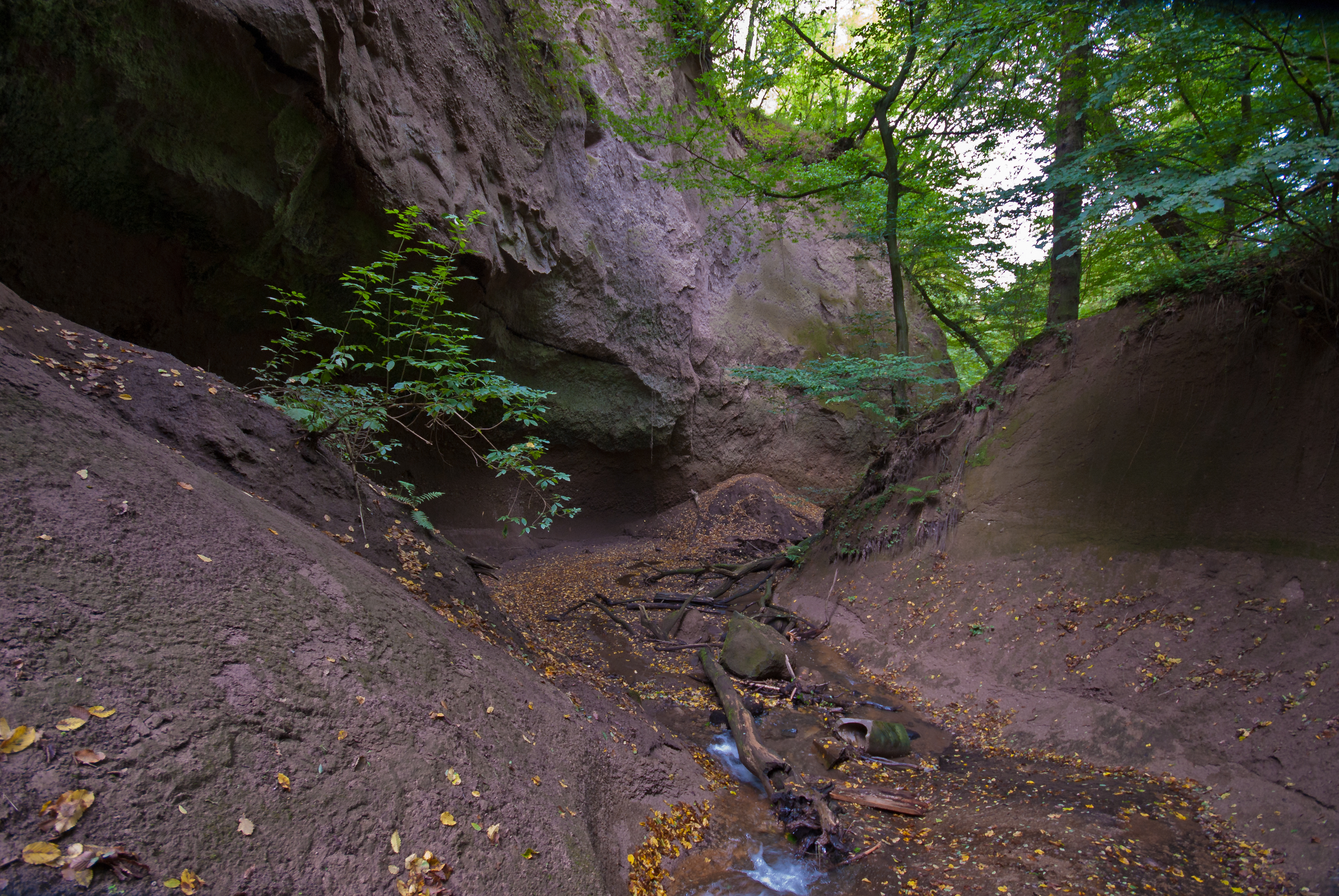 Die Wolfsschlucht im Tönistal zwischen Bad Tönisstein und Wassenach. Der Tönissteiner Bach gräbt sich durch die Trassschicht, welche beim letzten Ausbruch des Laacher See Vulkans rund 10.930 v. Chr. sich dort ablagerte.